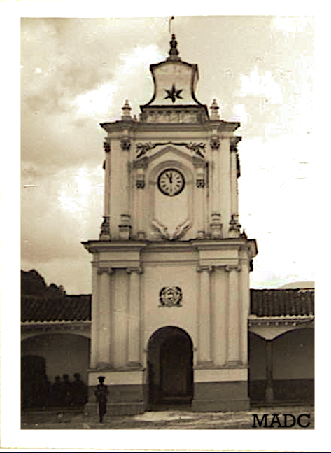 Monumental «Torre Centenaria≫ del ≪Batallón Sijeño» 1875 Écija Valle de Écija, Los Altos, República de Guatemala en Centro America